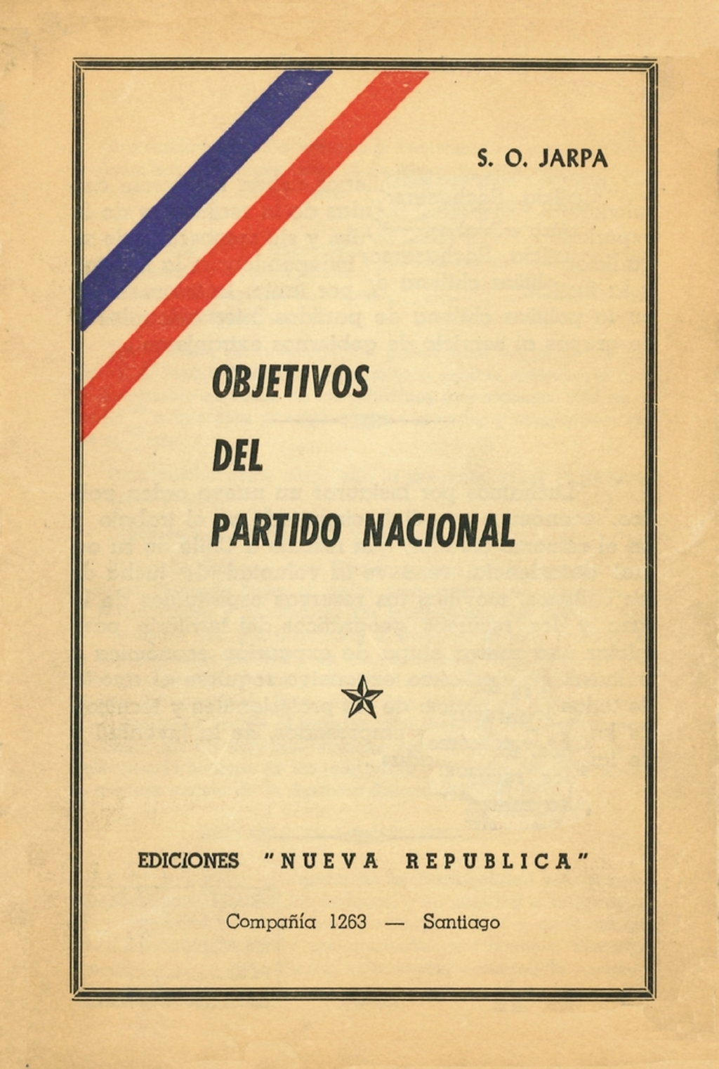 Fundación del Partido Nacional, 16 de junio de 1966.